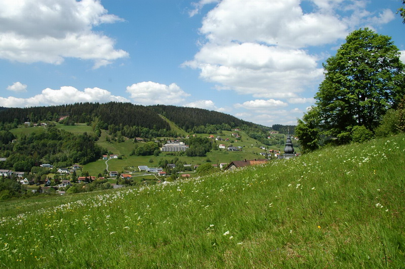 Blick auf Warmensteinach im Sommer